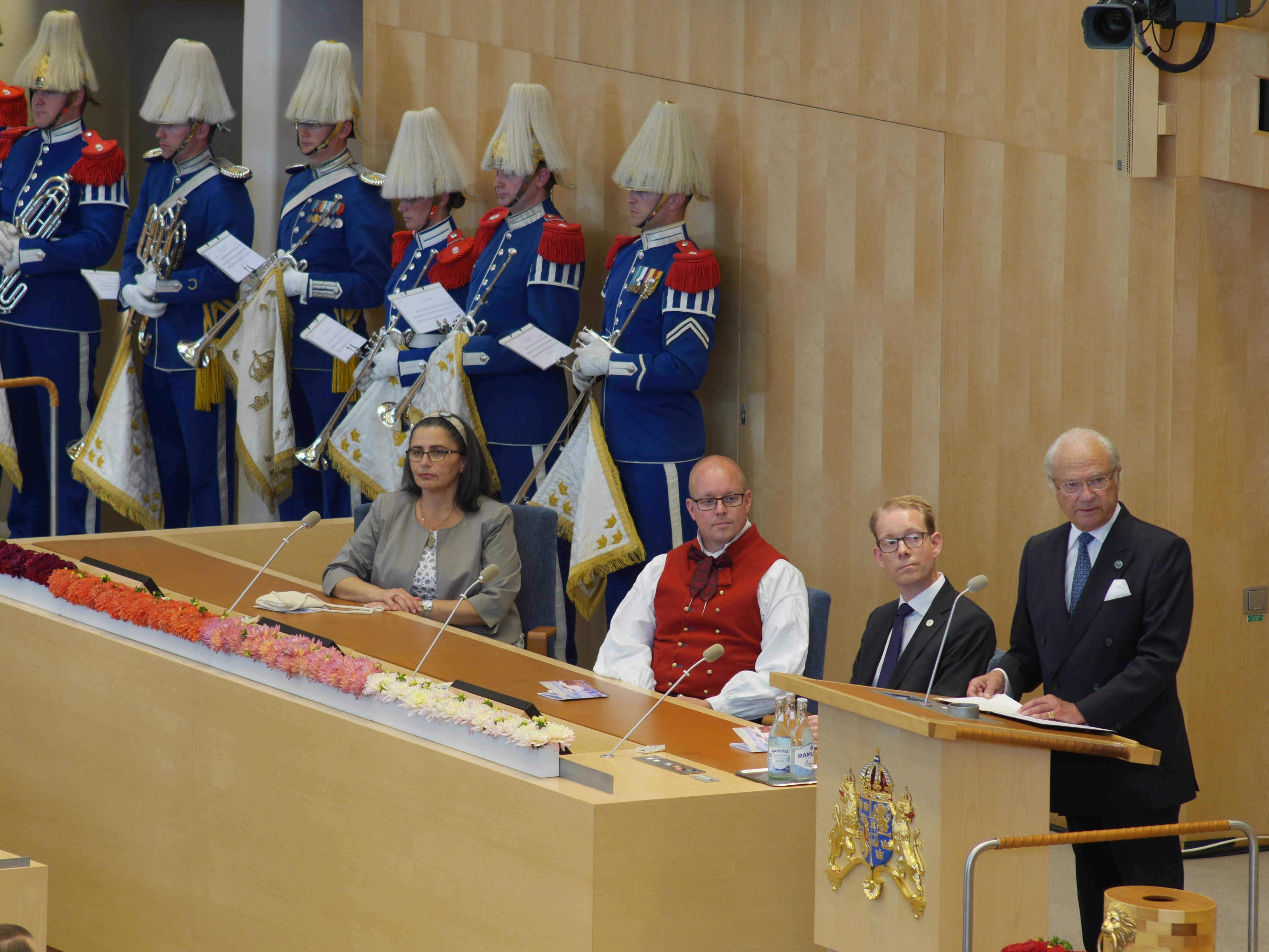 vid Riksmötets Öpnnande 2016